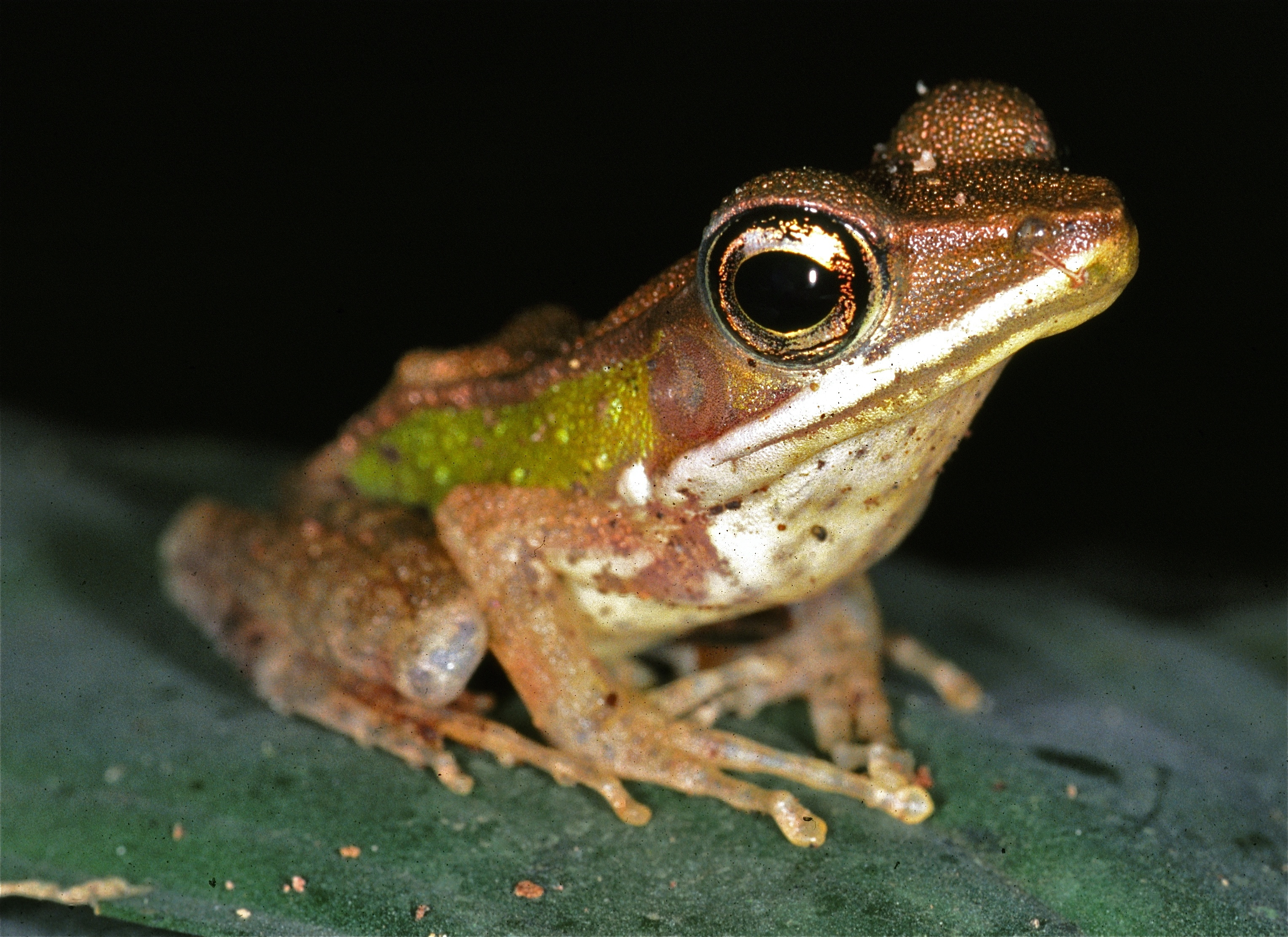 Korup NP, CAMEROON